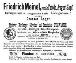 Anzeige des Bad Kissinger Holzspielzeugfabrikanten und -händlers Friedrich Meinel (??-1911)